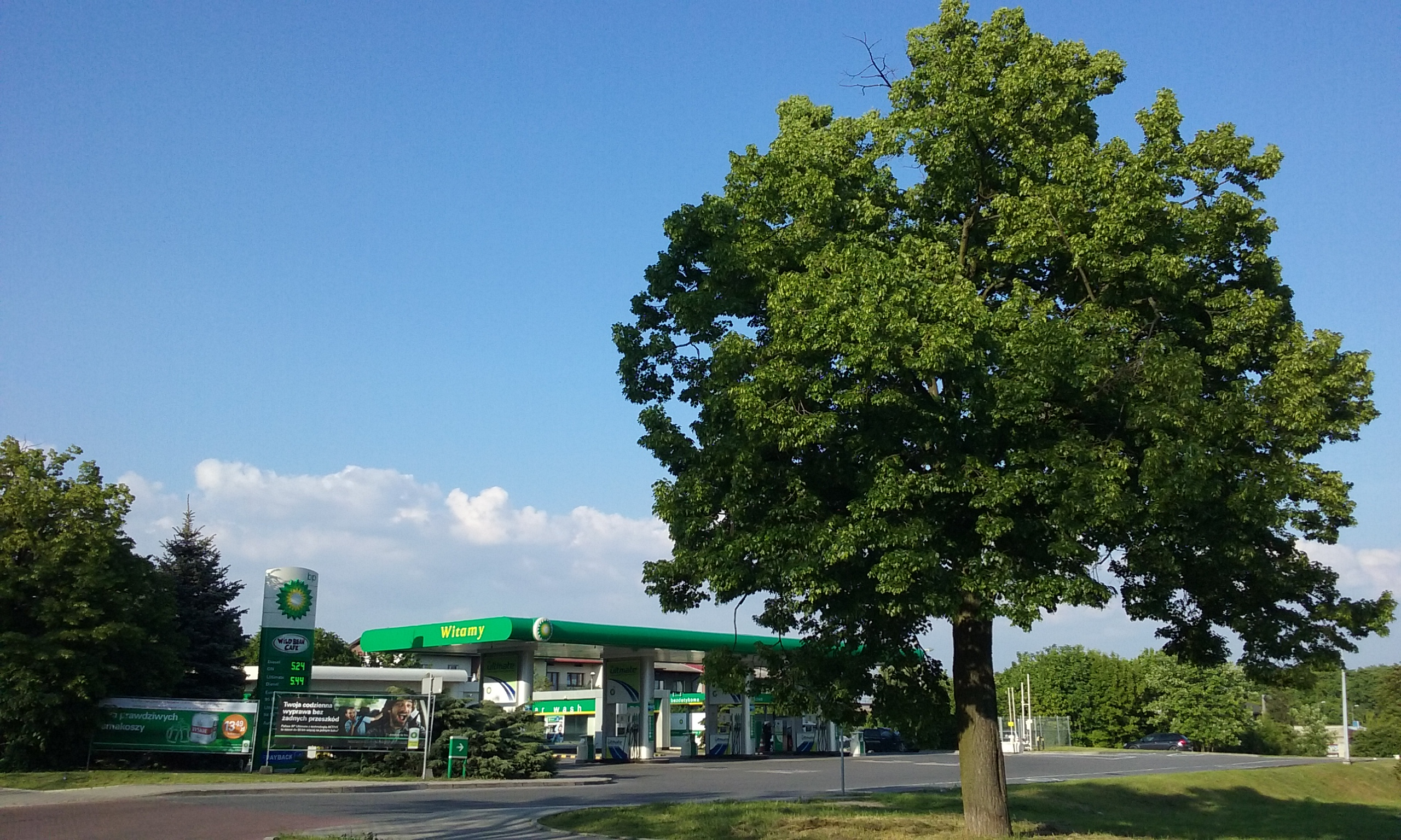 Stacja paliw British Petroleum (BP) w Tomaszowie Mazowieckim, w województwie łódzkim, PL, EU. CC0